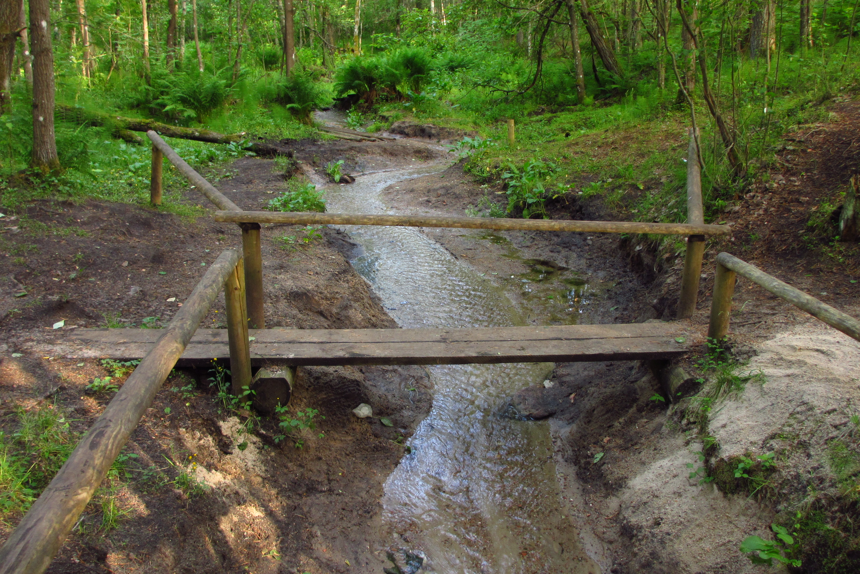 Aiataguse allikad